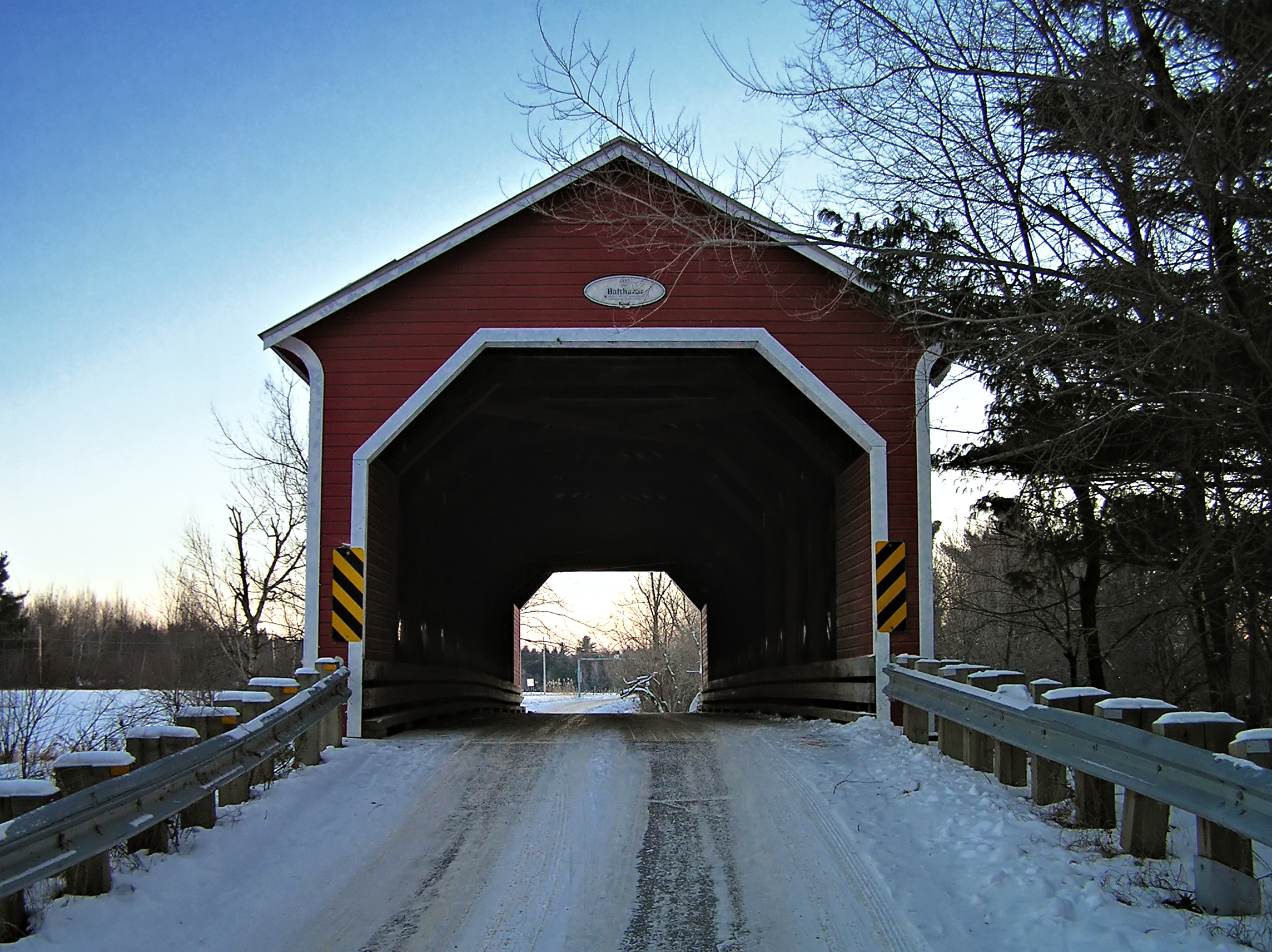 Brigham (Québec) - Pont couvert Balthazar (1932) sur la Yamaska